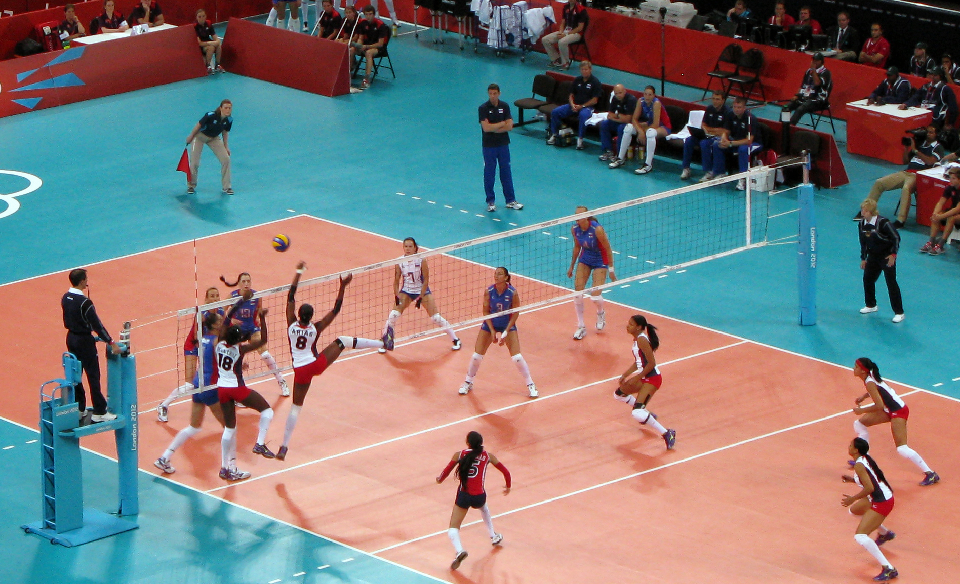 Volleyball, Russia vs Dominican Republic